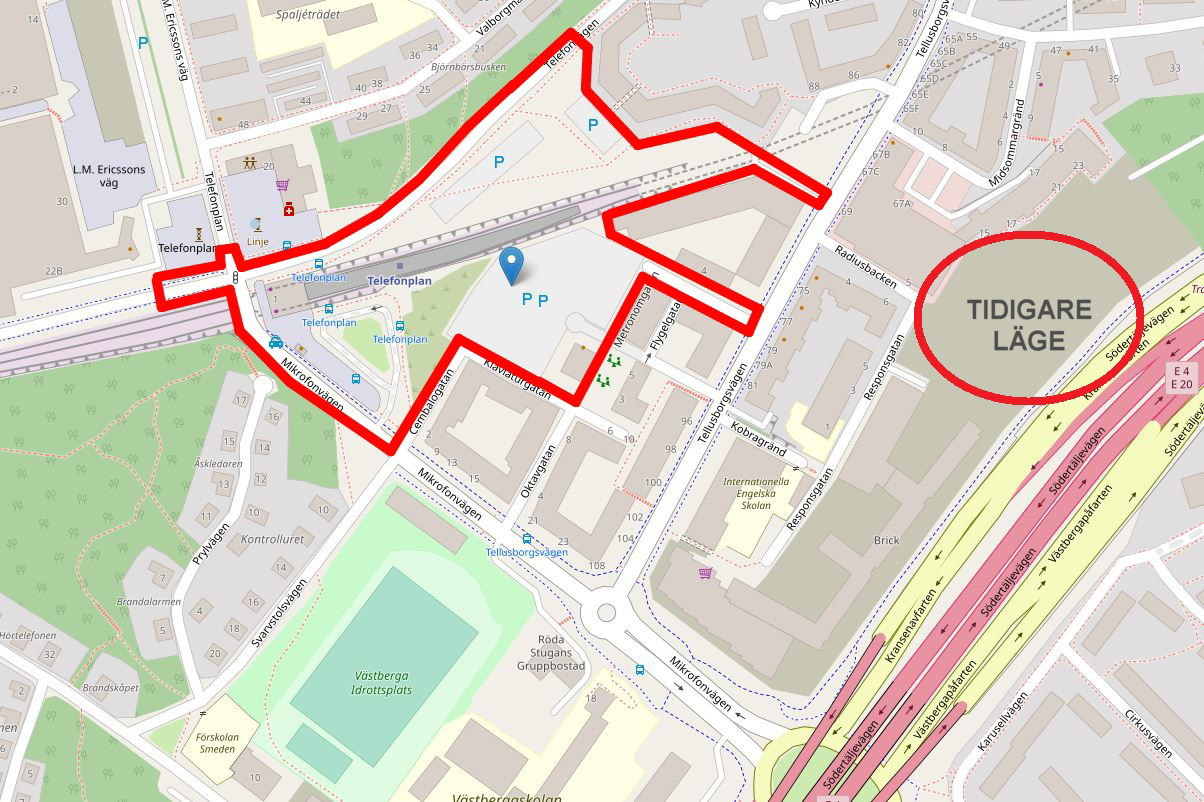 Tellus Towers, planområde inritat på Open Street Map